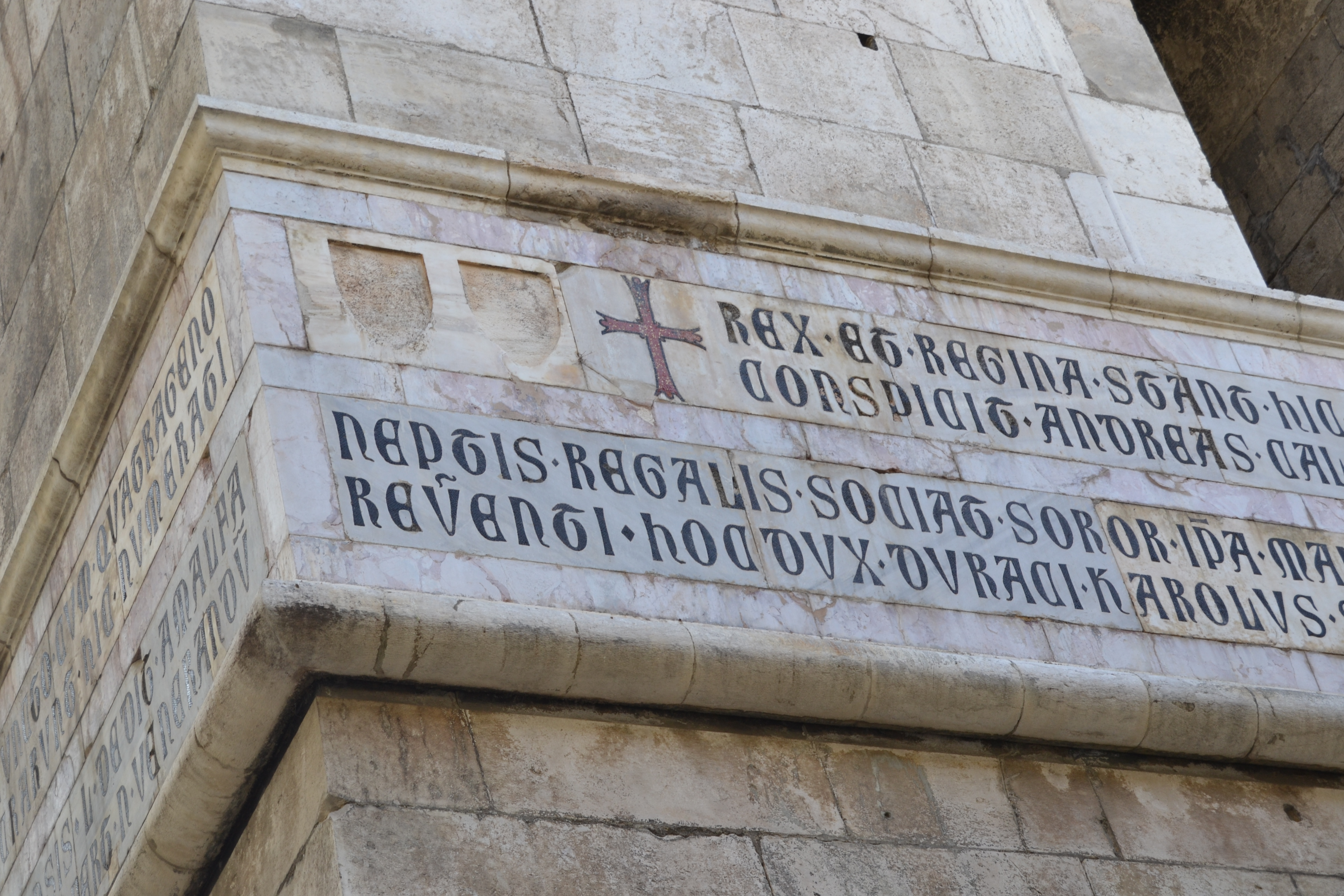 Campanile di Santa Chiara (Napoli) - Particolare dell'inscrizione gotica angioina su una delle facciate